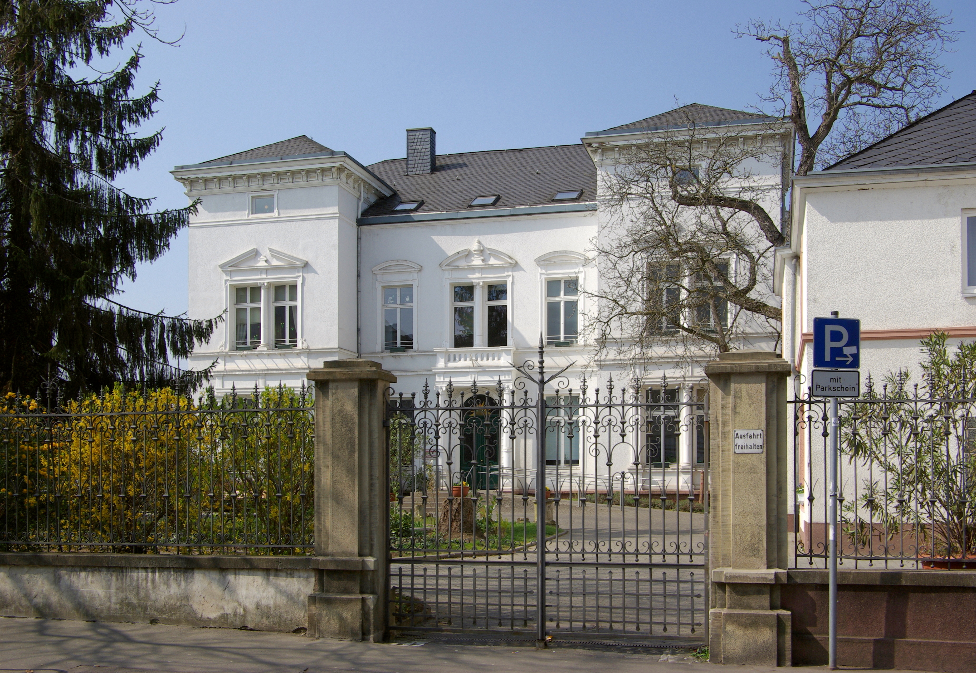 Trier, Paulinstraße 14: Villa Laeis/Villa Henn; repräsentativer kubischer Neurenissancebau mit flachen Walmdächern, 1874, zwei Nebengebäude